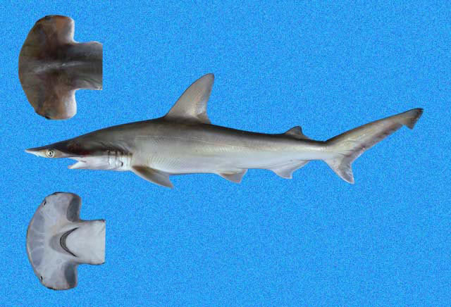 Sphyrna media